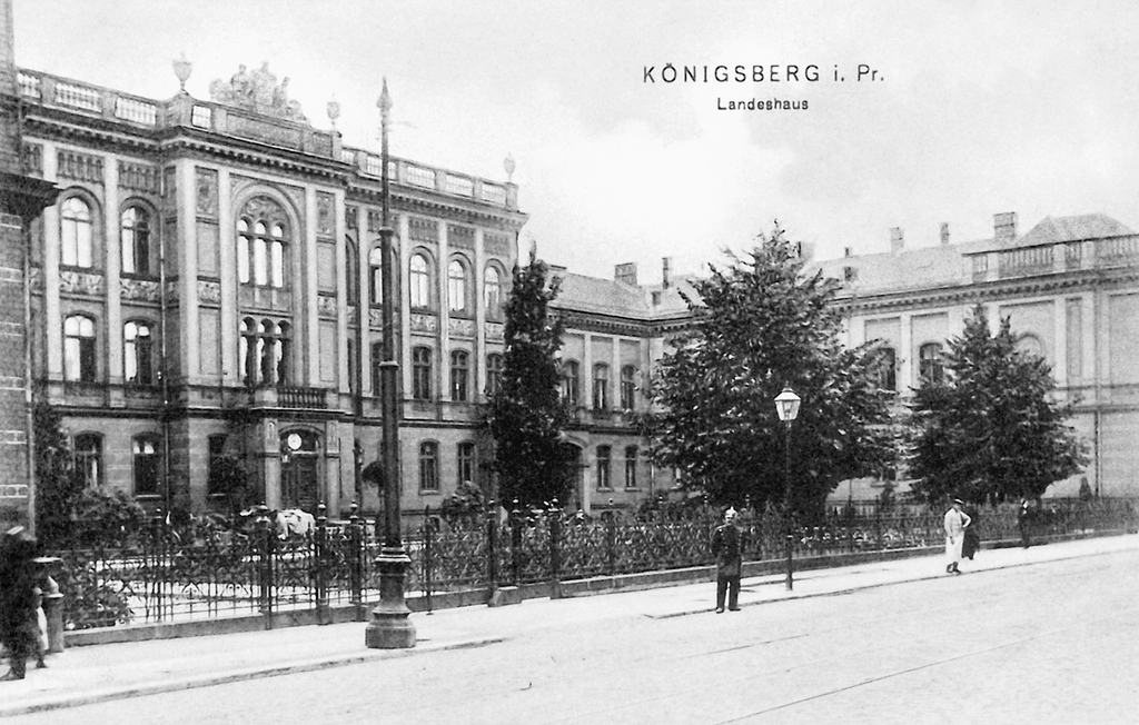 Königsberg